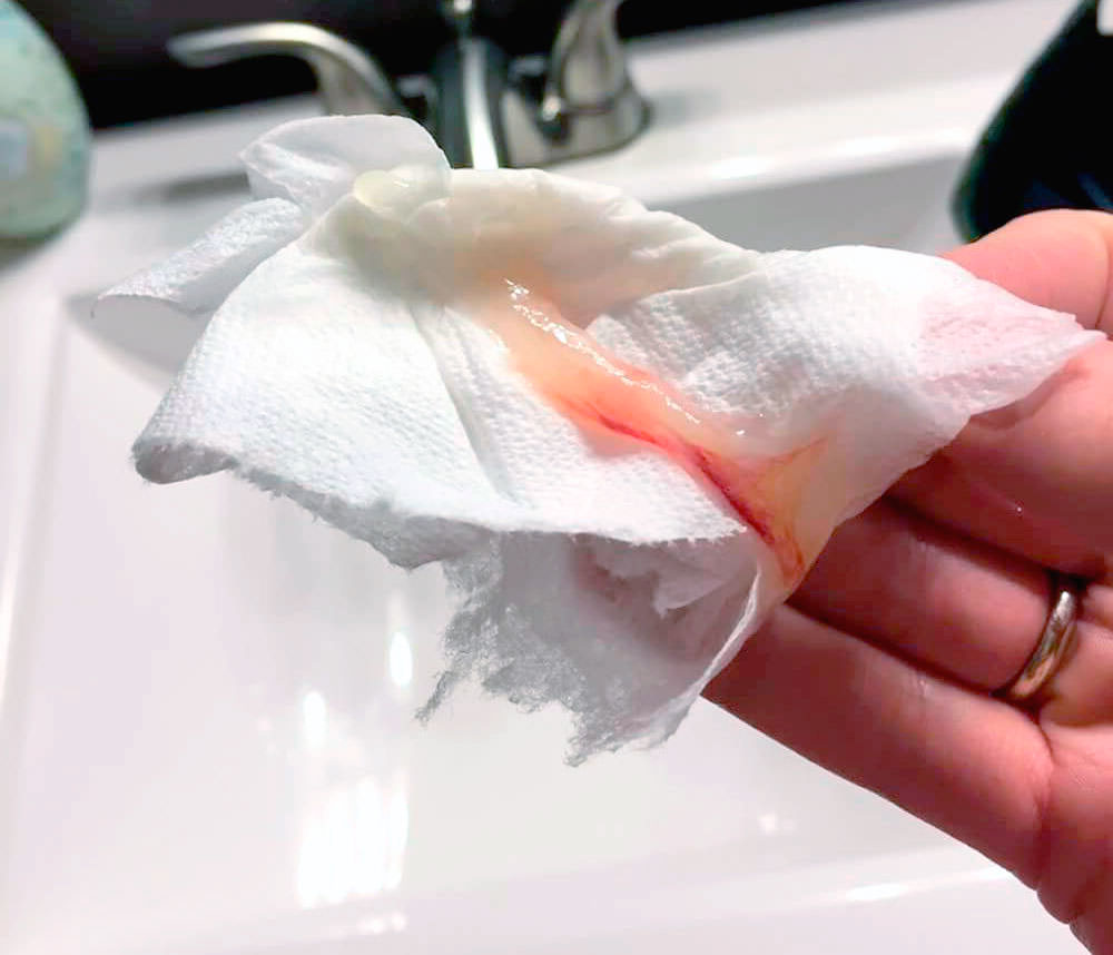 Kako-izgleda-Sluzavi-Čep